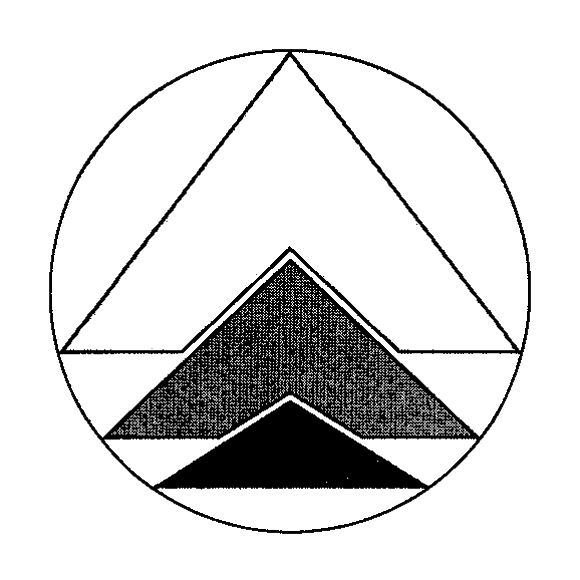 Logo